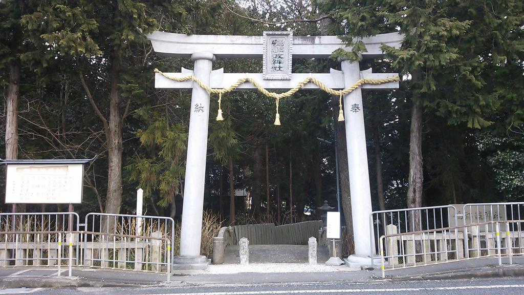 鴨都波神社鳥居